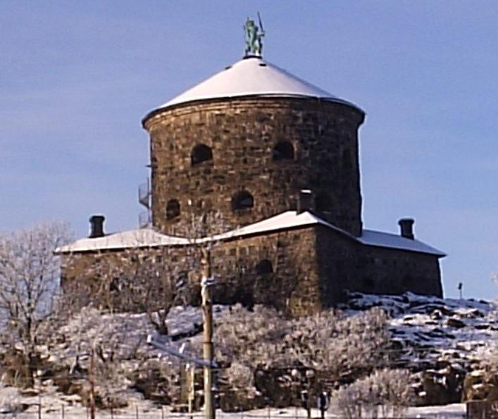 Skansen Lejonet i Göteborg, den 20 december 2004. En bild tagen av Harri Blomberg.